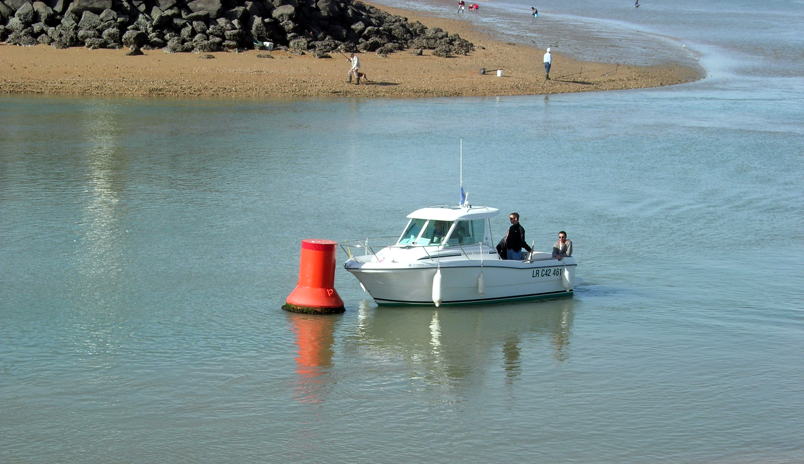 Description =Un bateau école en manoeuvre à l'entrée du port des Minimes Source =Photo taken by Remi Jouan Date =Octobre 2006 Author =Remi Jouan